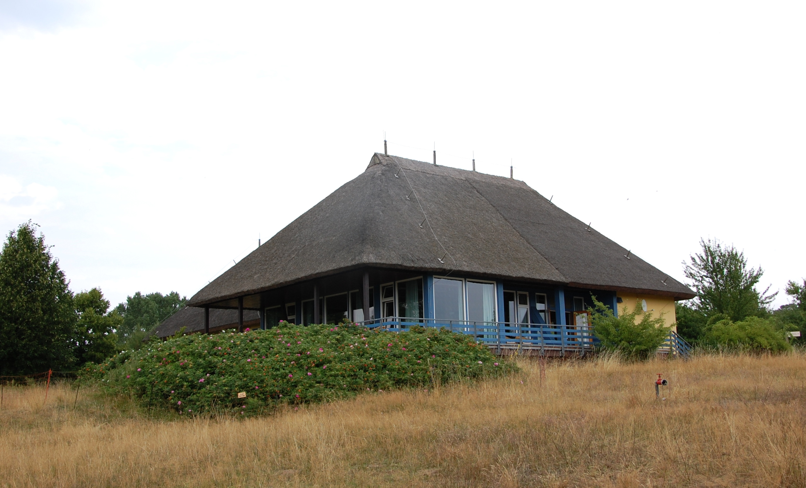 Vilm Gesellschaftshaus